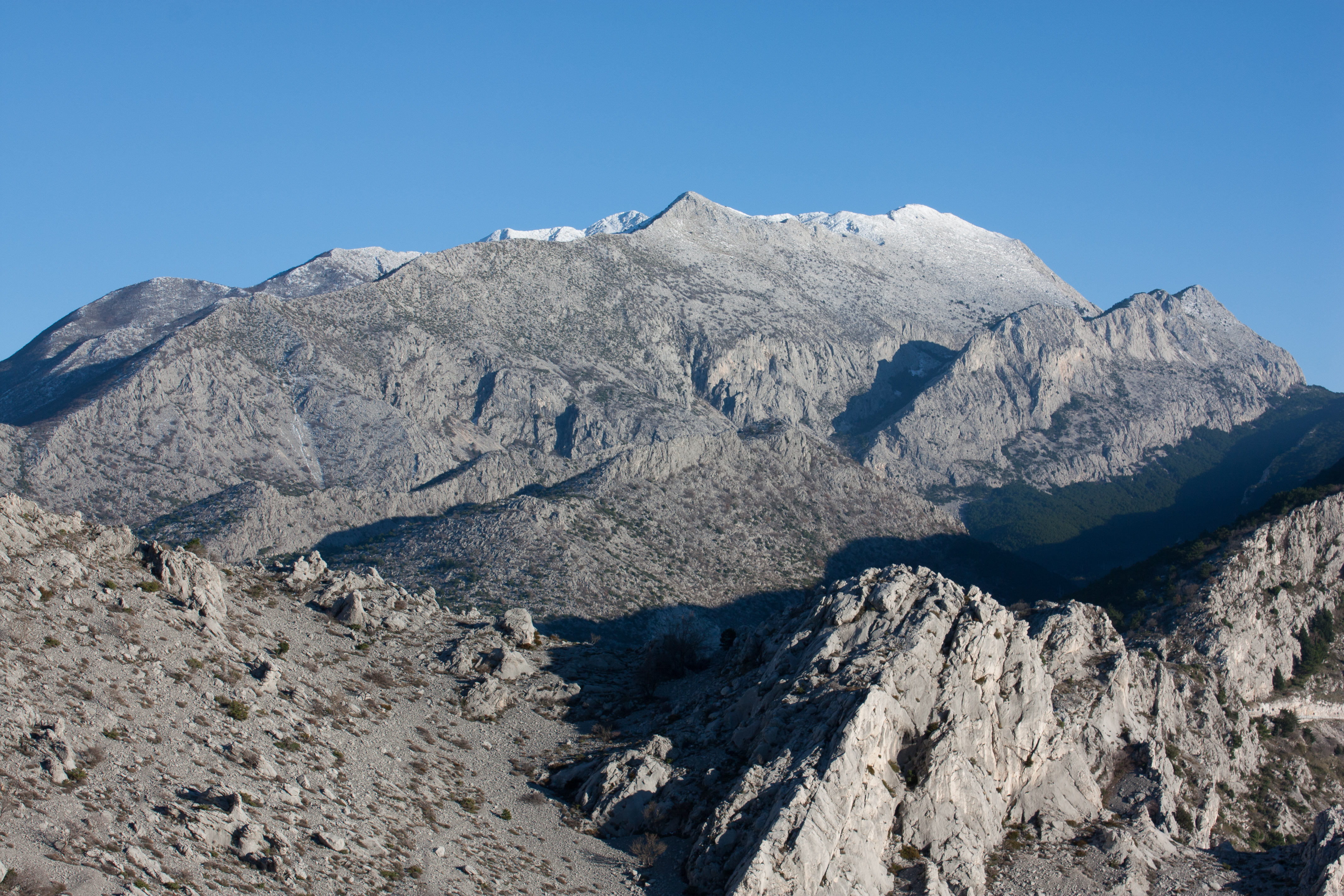 Biokovo près de Gornja Brela